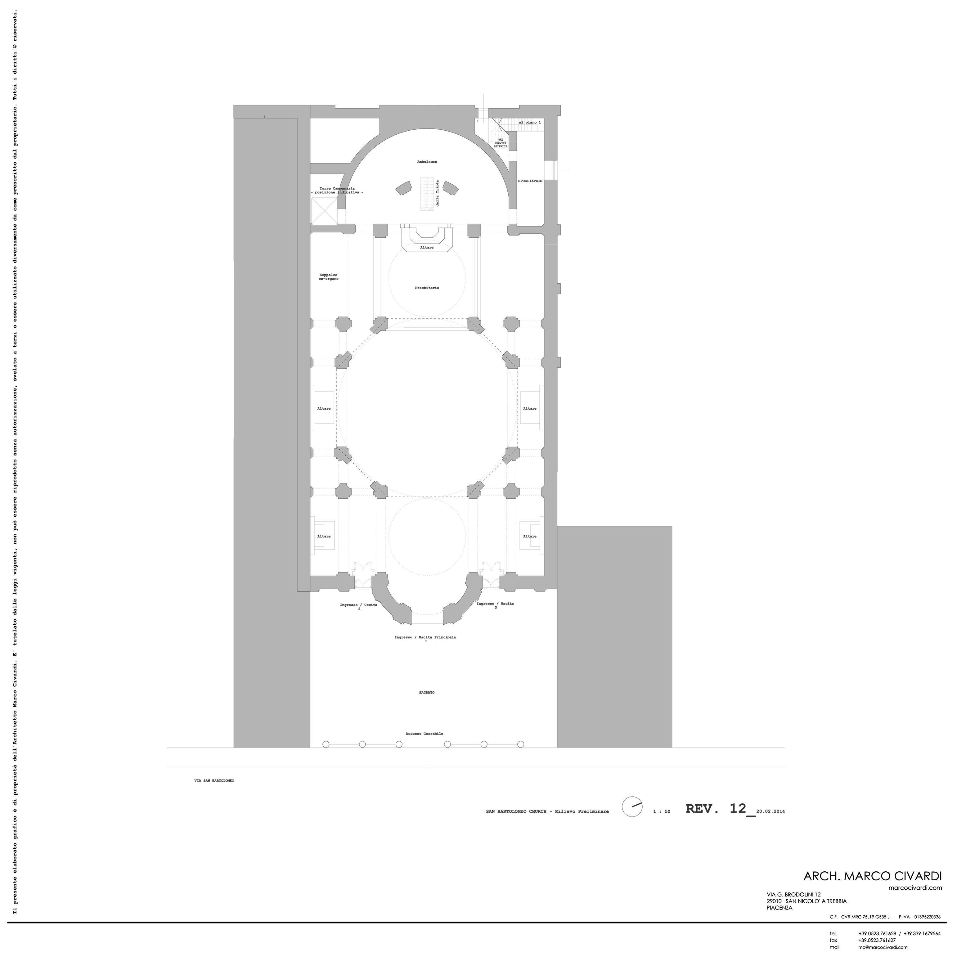 Rilievo della Chiesa di San Bartolomeo _ PIANTA _ courtesy © Marco Civardi _